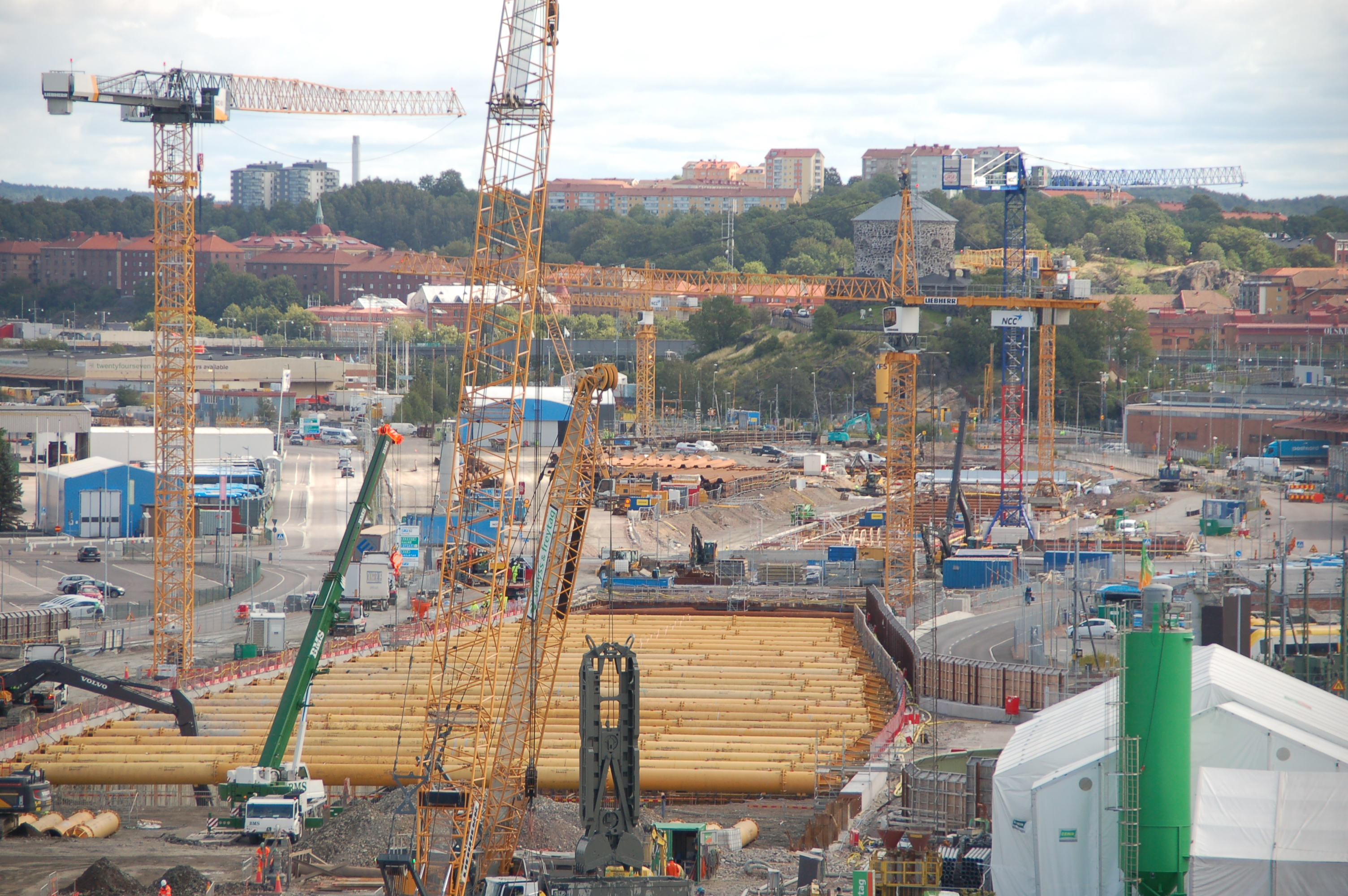 Västlänken, byggnation 2020 vid Centralen i Göteborg